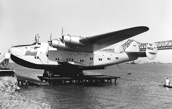 Boeing314An18602april39 copyXX